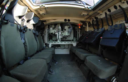 Interno del VBM Freccia, Esercito Italiano